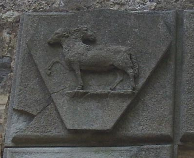 Villa di maiano, stemma alessandri